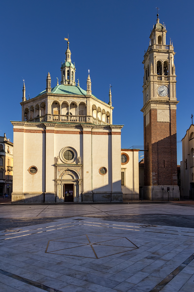 Santuario di Santa Maria di Piazza This is a photo of a monument which is part of cultural heritage of Italy.